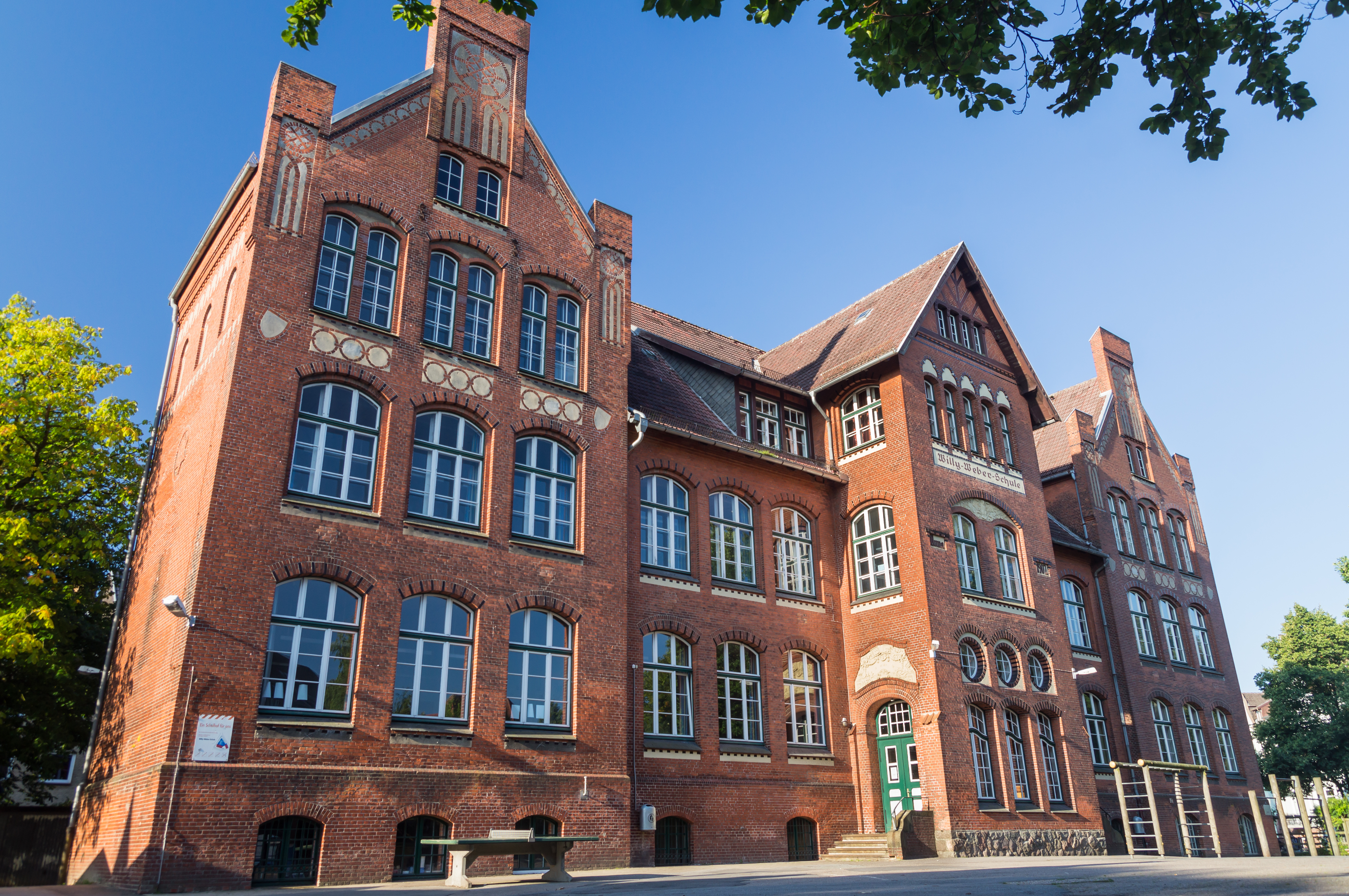 Flensburg-Jürgensby, Jürgensgaarder Str. 42. Willy-Weber-Schule - zum Zeitpunkt der Aufnahme Haus II der Goethe-Schule